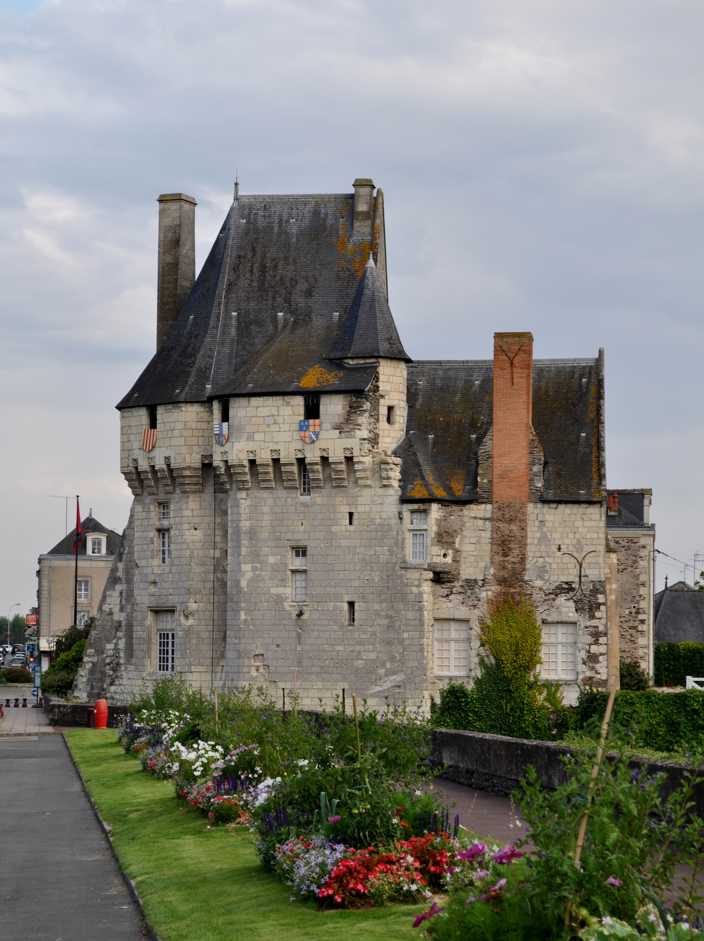 Château des Ponts-de-Cé (Maine-et-Loire) .